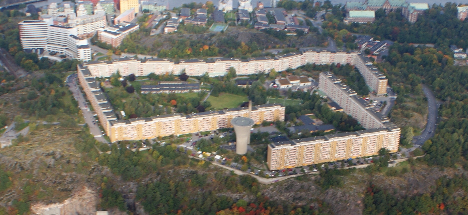 Henriksdal sedd från helikopter.